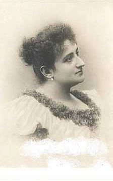 Guerrina Fabbri